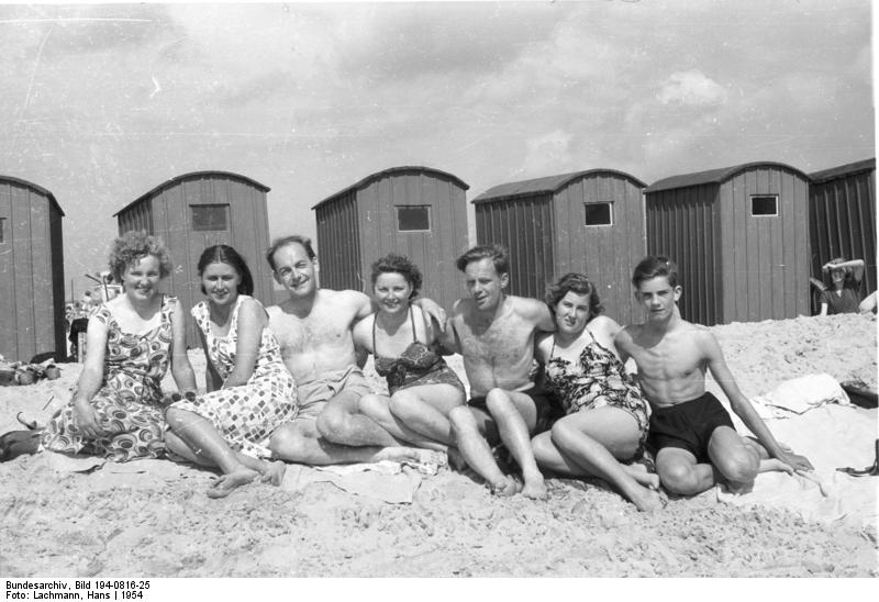 Ferienfreizeit des CVJM, Borkum 1954